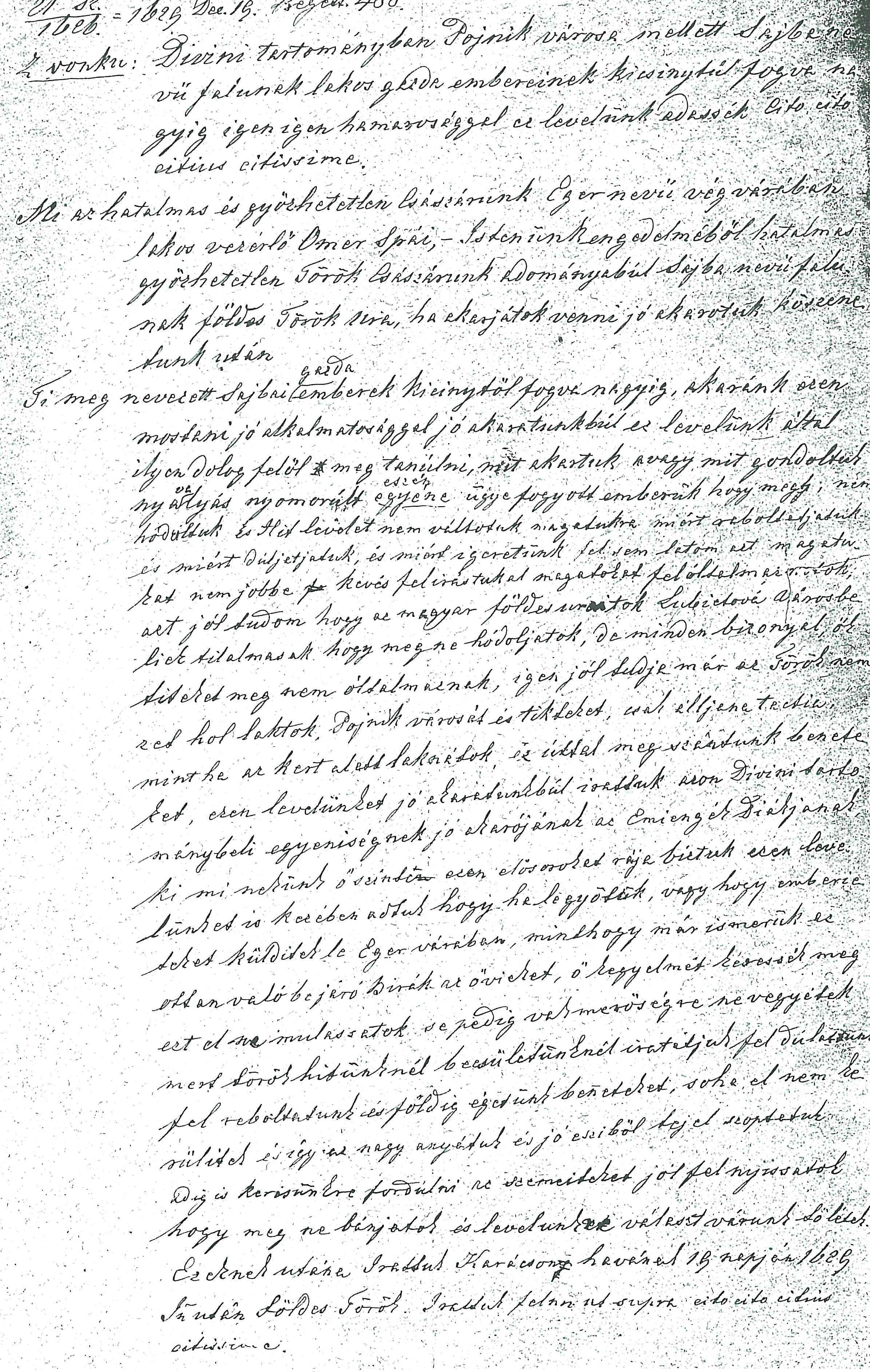 Výhražný list tureckých spahiov z Jágerského hradu obyvateľom Šajby